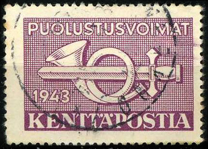 Пример оригинальных марок военно-полевой почты: безноминальная почтовая марка полевой почты Финляндии на оккупированной советской территории Восточной Карелии, 1943 (Михель #3; Ивер #5).